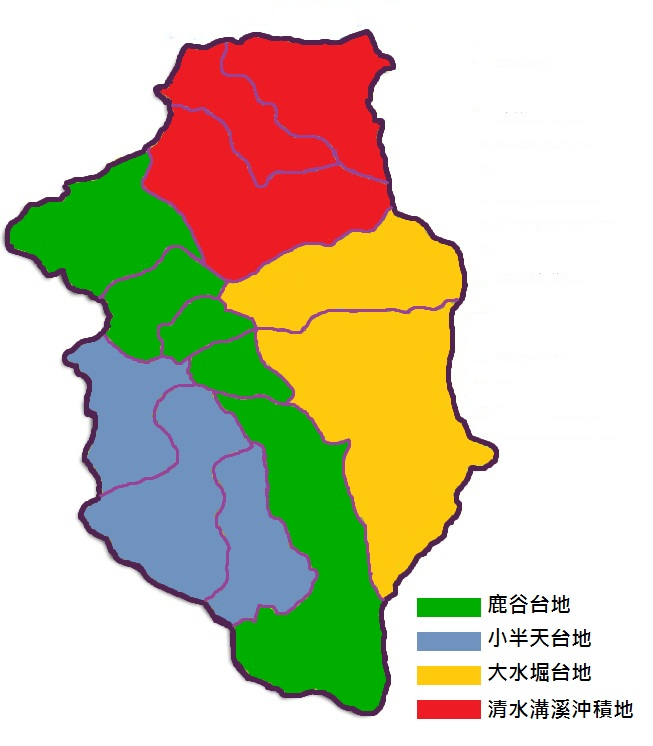 中文（台灣）: 鹿谷鄉次分區圖